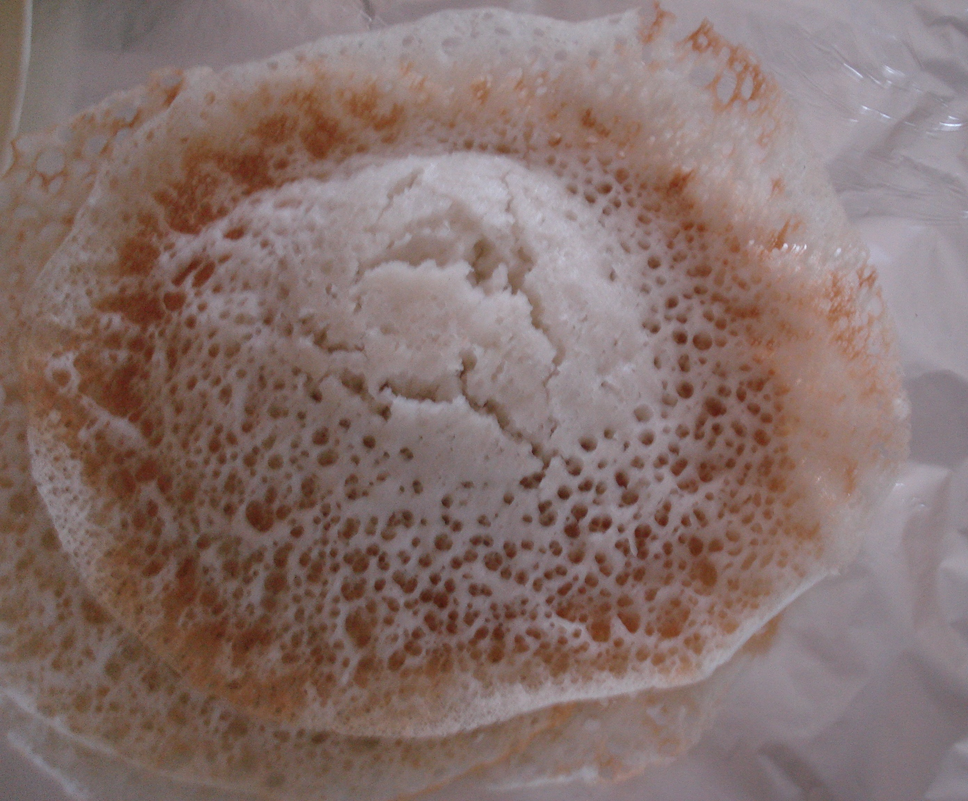 ഒരു കേരളീയ വിഭവമായ പാലപ്പം